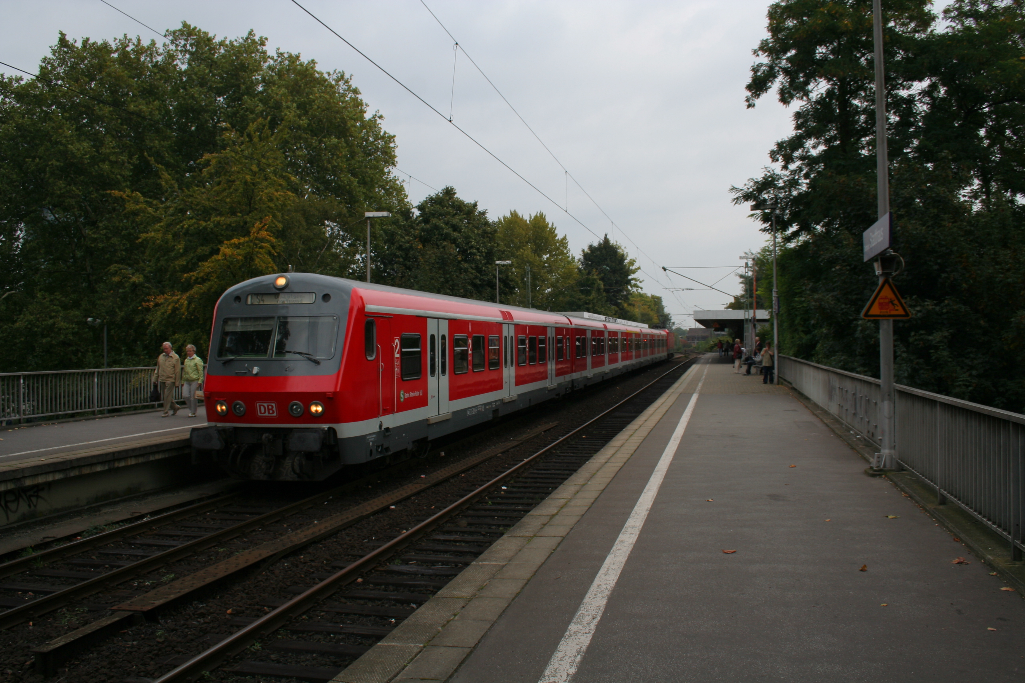 S-Bahnhalt Stadthaus in Dortmund. Bahnsteig.